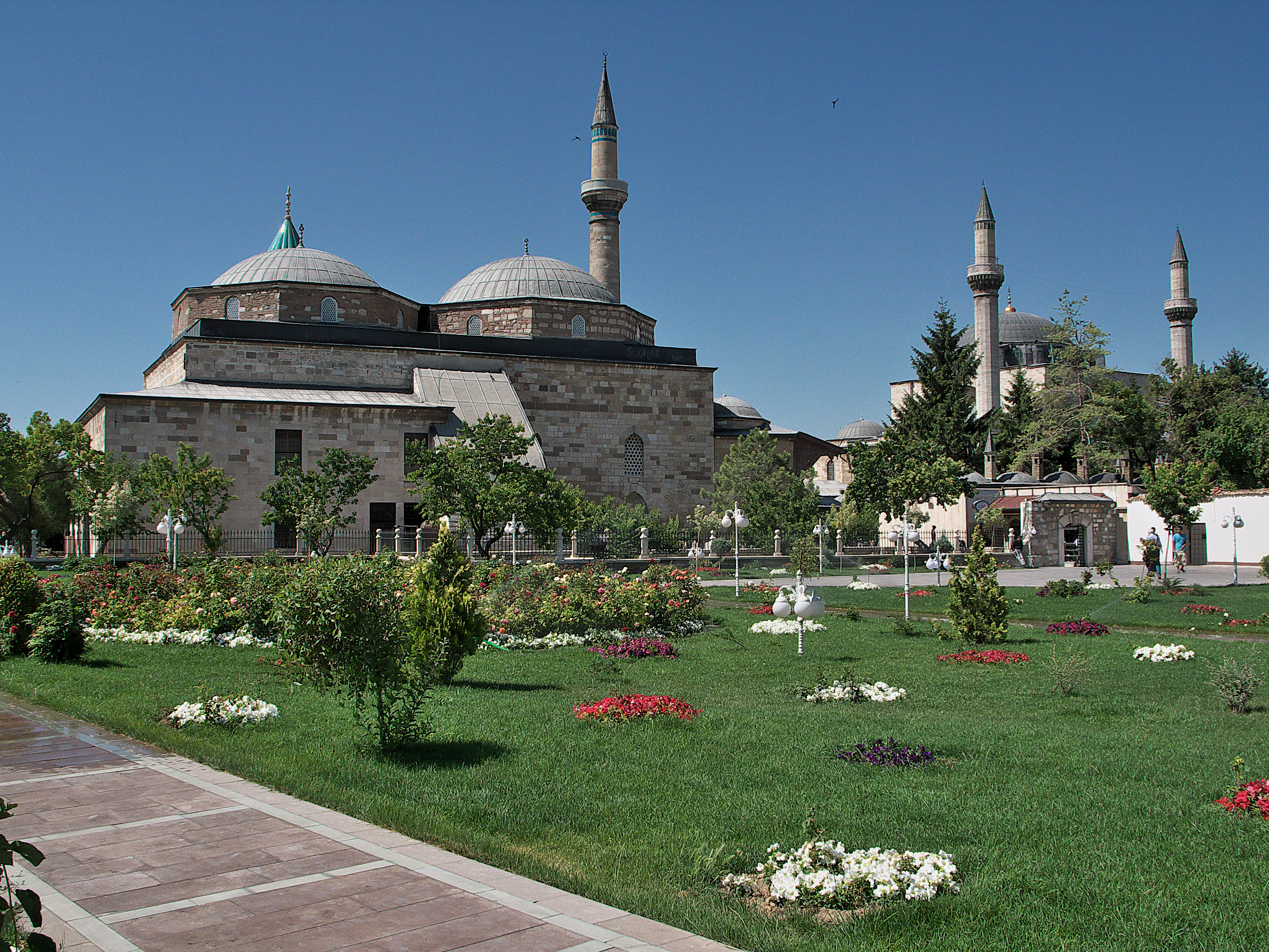 Mevlâna Müzesi. El llamado Convento de Mevlana Türbesi (Yalal ad-Din Muhammad Rumi) centro de formación de los derviches giróvagos.